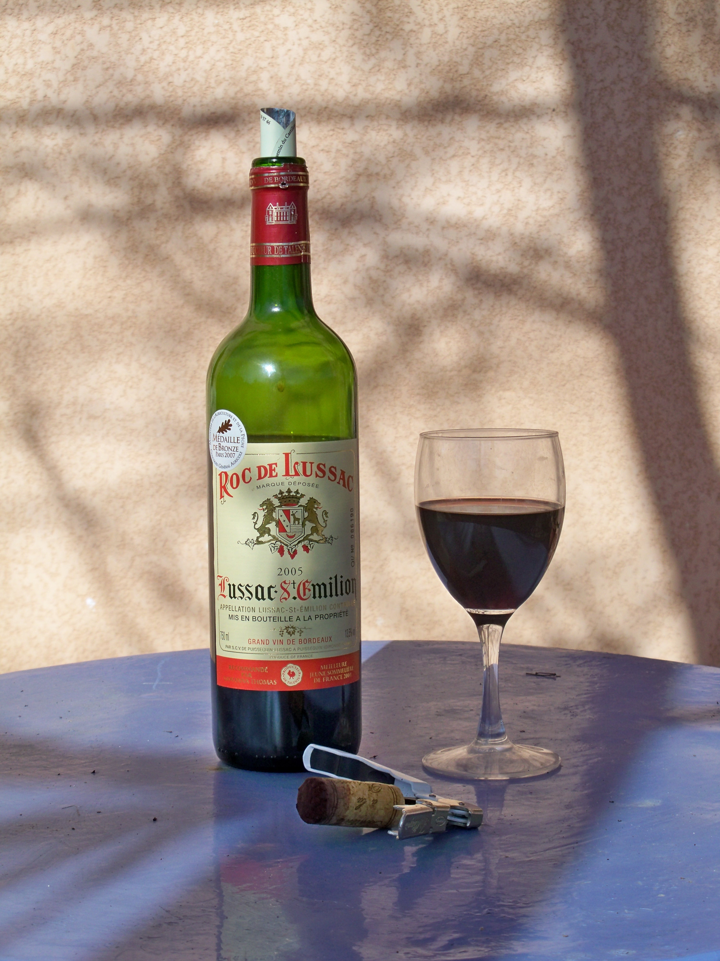 bouteille de Lussac Saint Emilion, avec système anti goutte "Drop Stop"